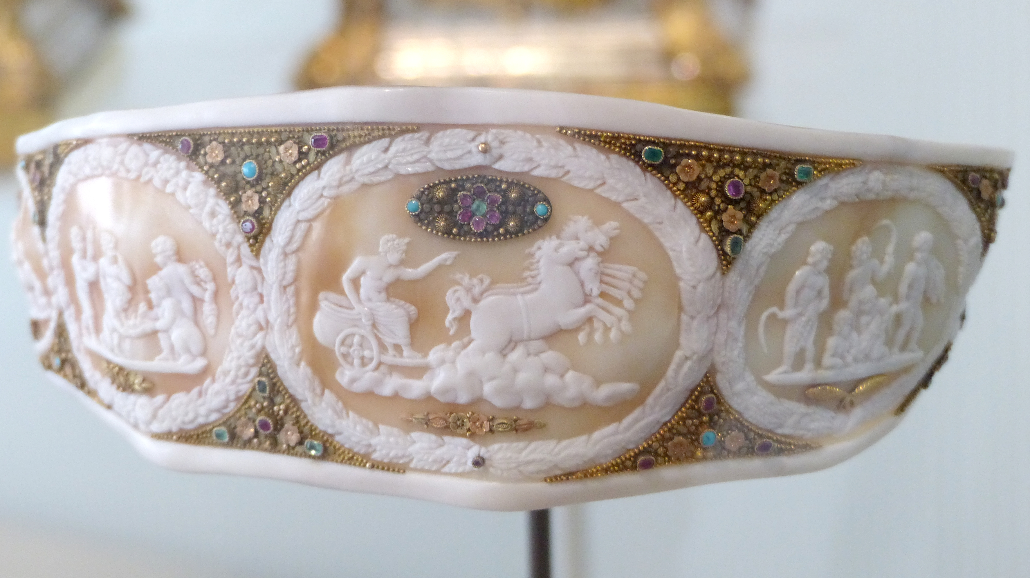 Nice (Alpes-Maritimes, France), sur la promenade des Anglais, la Villa (palais plutôt) Masséna, siège du musée du même nom. Le diadème de Joséphine en nacre, or, perles et pierres de couleur, offert par Murat à l’impératrice. Le support en nacre est constitué d'un seul morceau de coquillage découpé dans le labre supérieur d'un Cassis cornuta. Cinq camées cernés d'un rameau feuillagé ou fleuri, de dimension décroissante vers l'arrière, représentent au centre le char d'Apollon, à gauche le printemps et l'hiver, à droite l'été et l'automne.